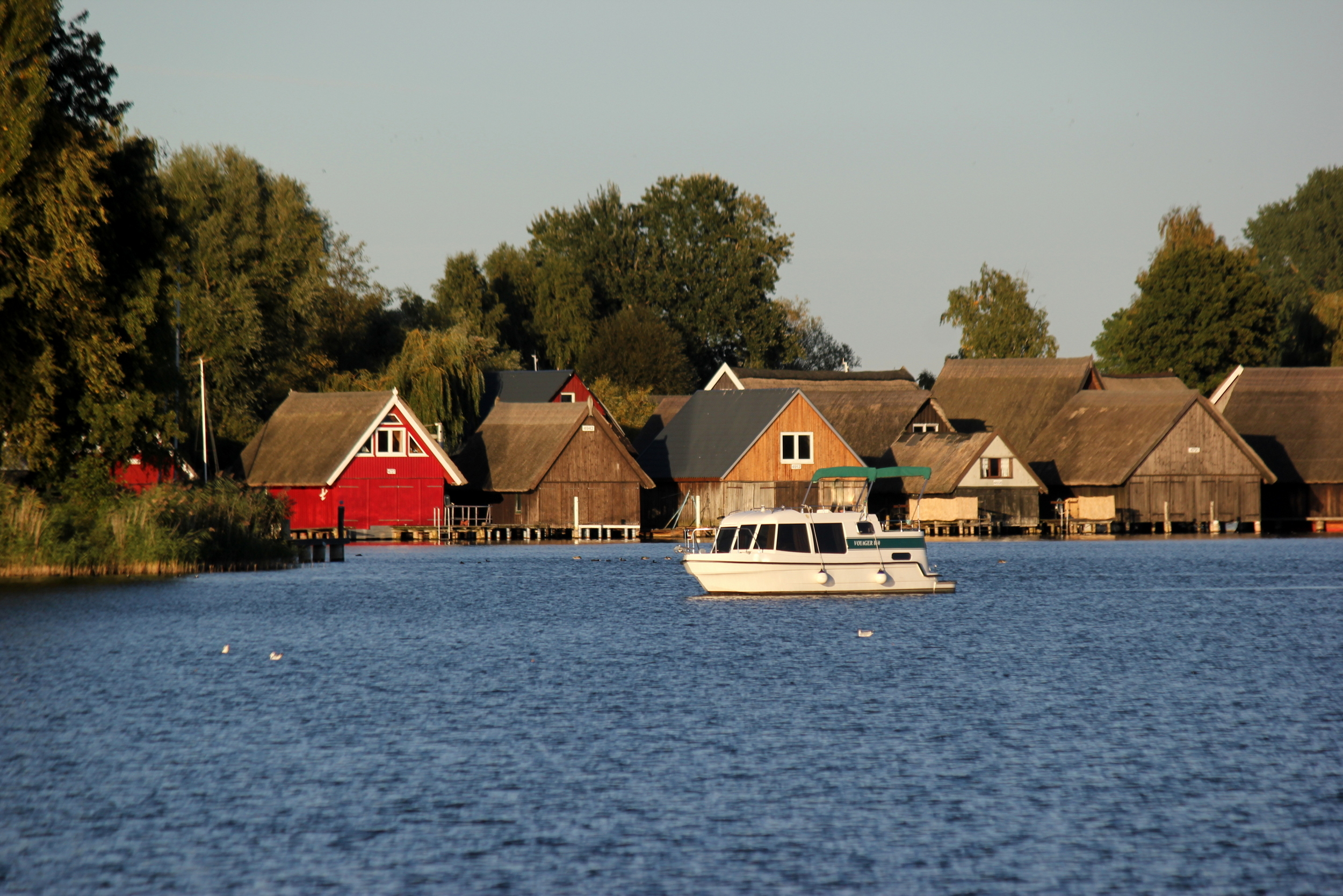 Hornjoserbsce: Čołmarnje w Röbelu při Moricy, Mecklenburgsko-Předpomorska.